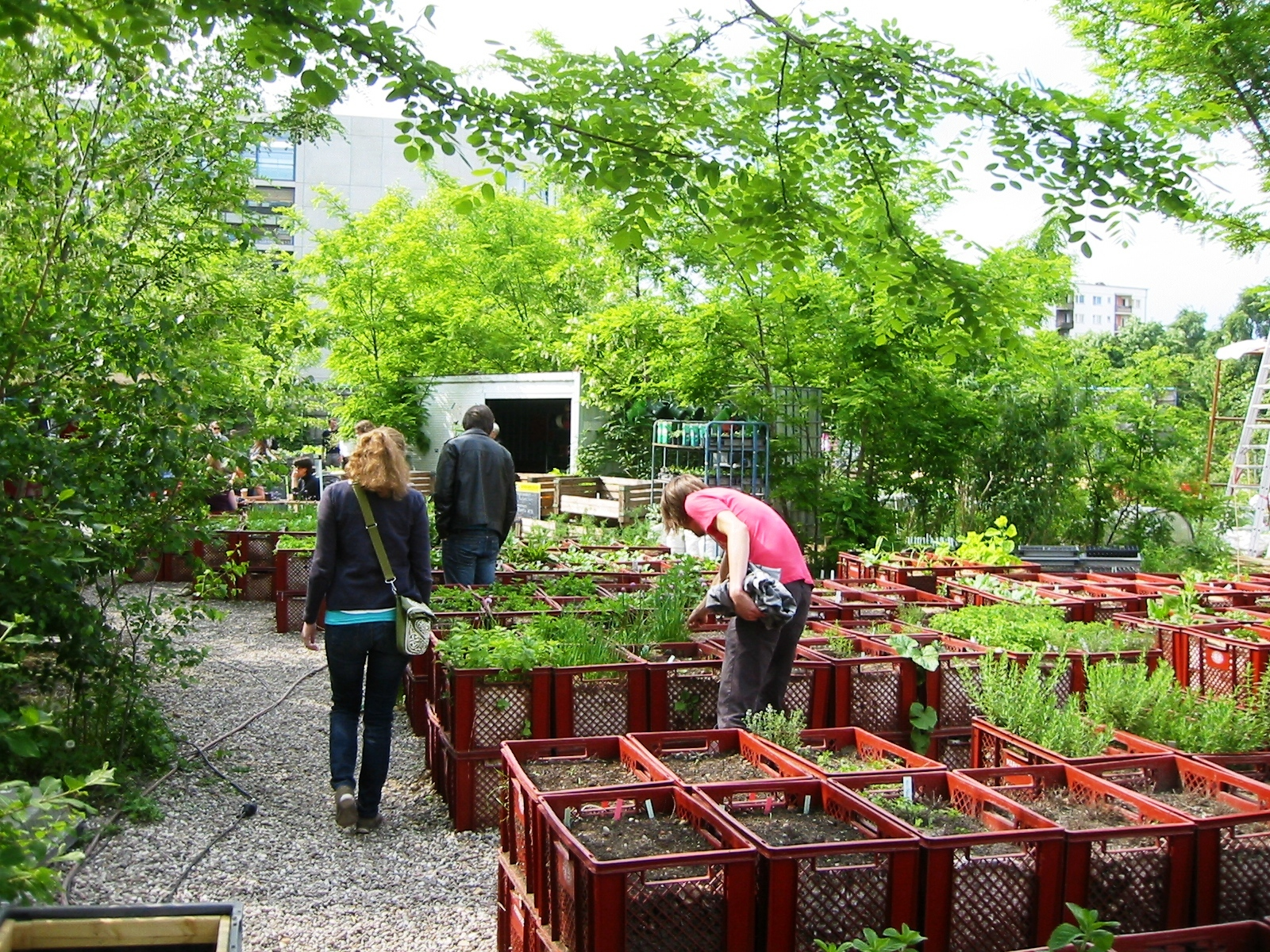 Prinzessinnengärten in Berlin-Kreuzberg: Auswahl an Pflanzen